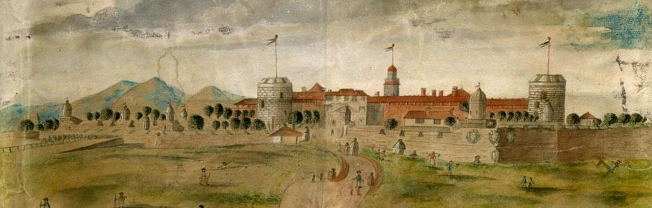 veduta-del-castello sforzesco di-Milano-acquerello-1795